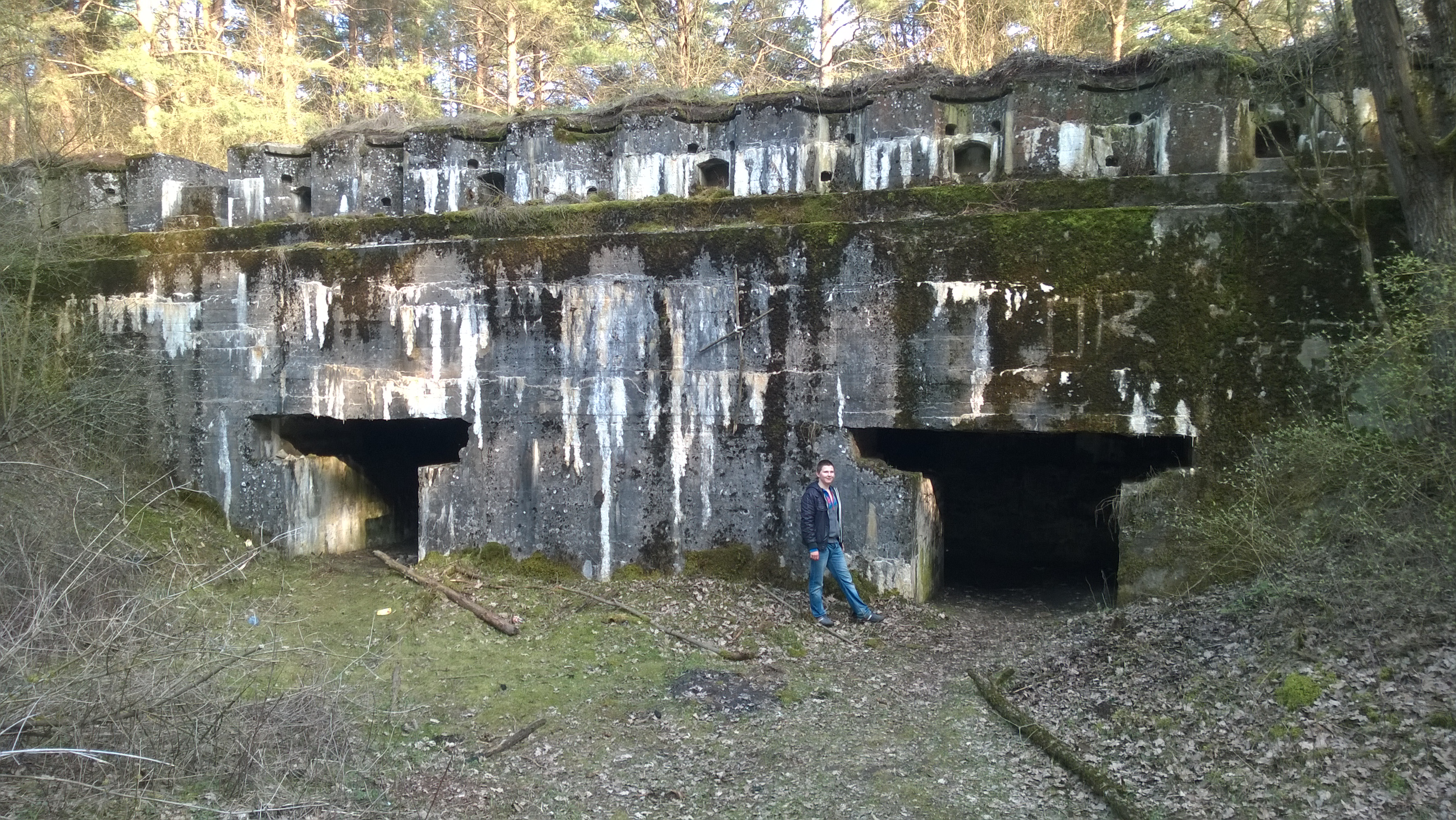 Grodna District, Belarus